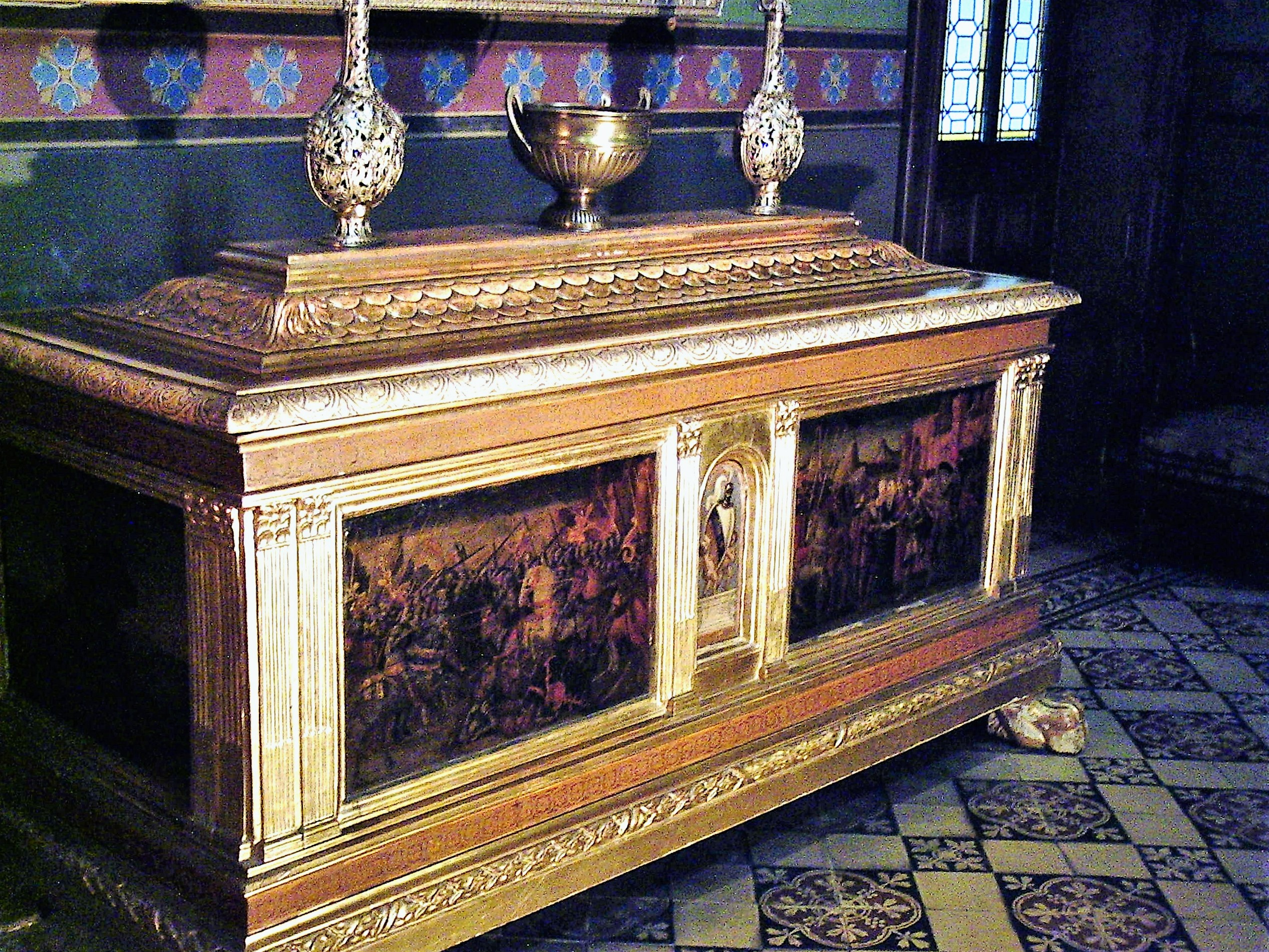 Die bretonische Burg in Combourg, Ausstattung.